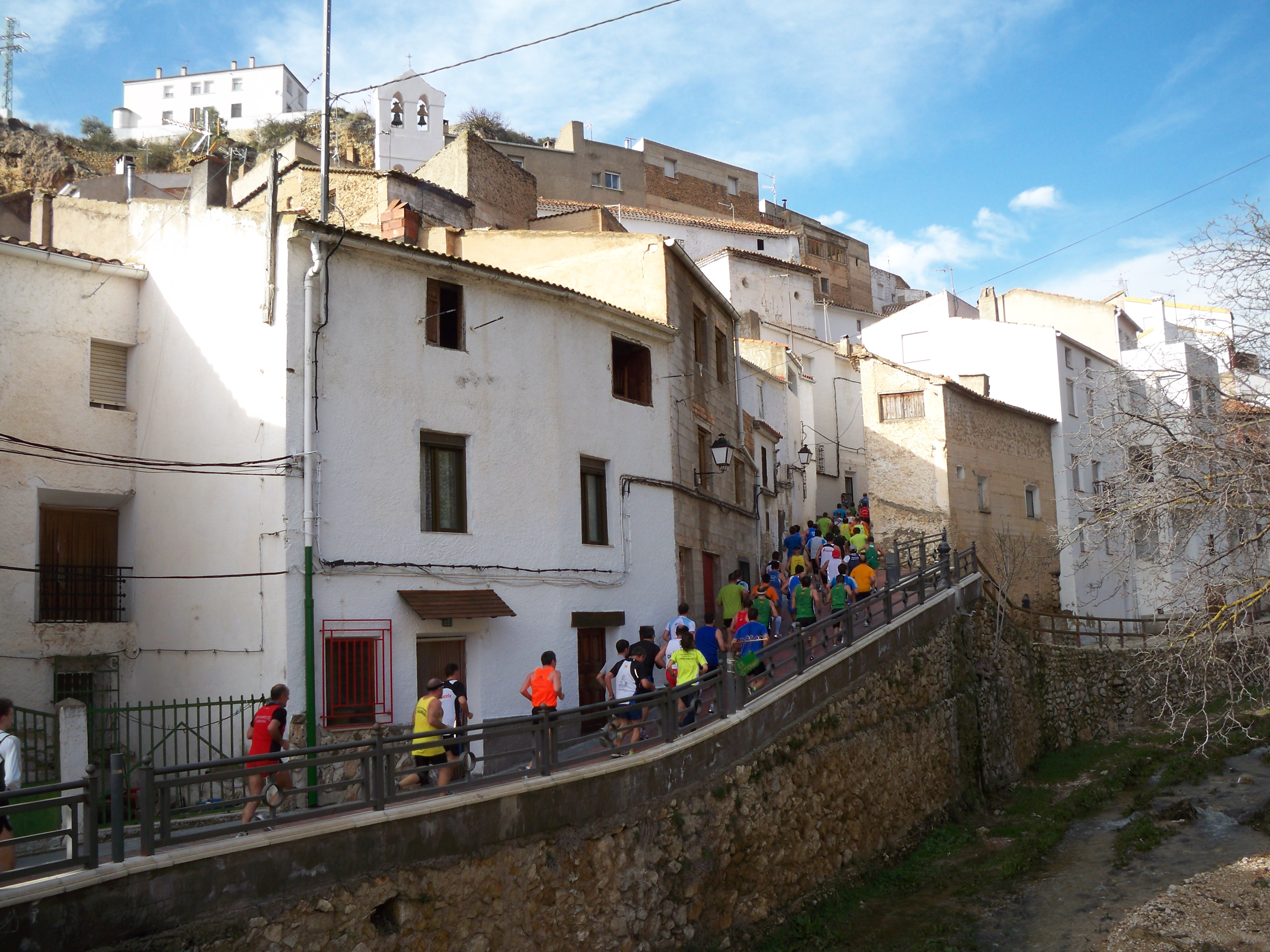 Imagen de la IV Carrera Popular de Molinicos (Albacete) a su paso por el Barranquito.